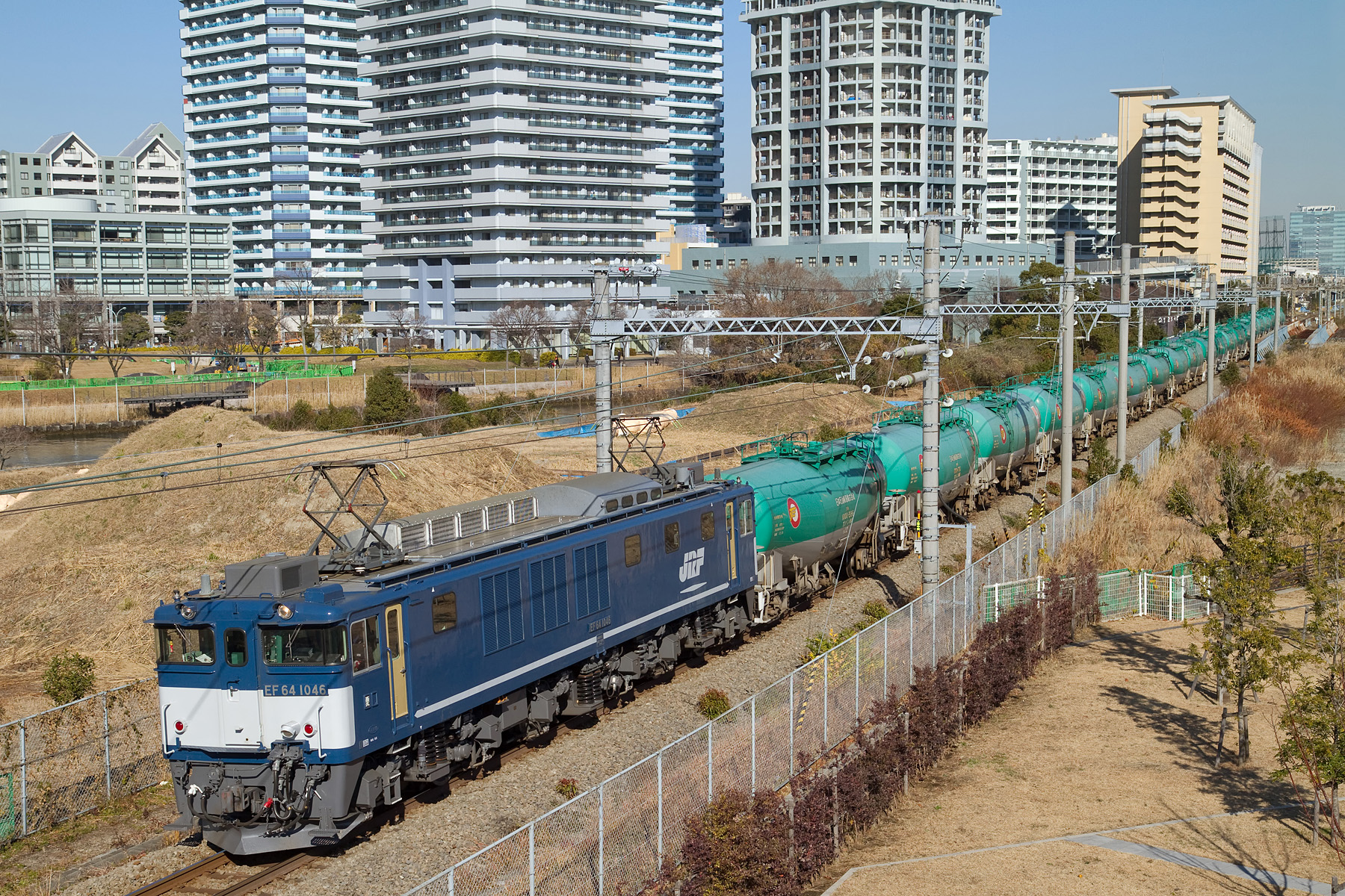 高島線・旧高島駅付近をゆく貨物列車